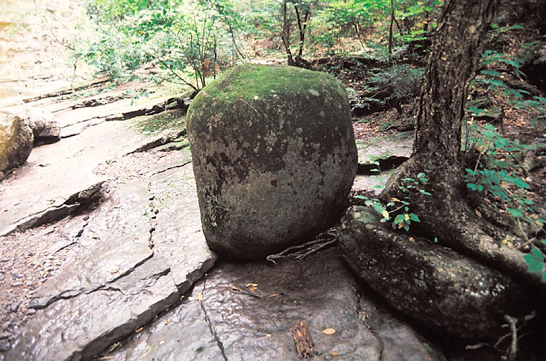 Bloc erratique que l'on trouve dans le parc de la falaise et de la chute Kabir Kouba.